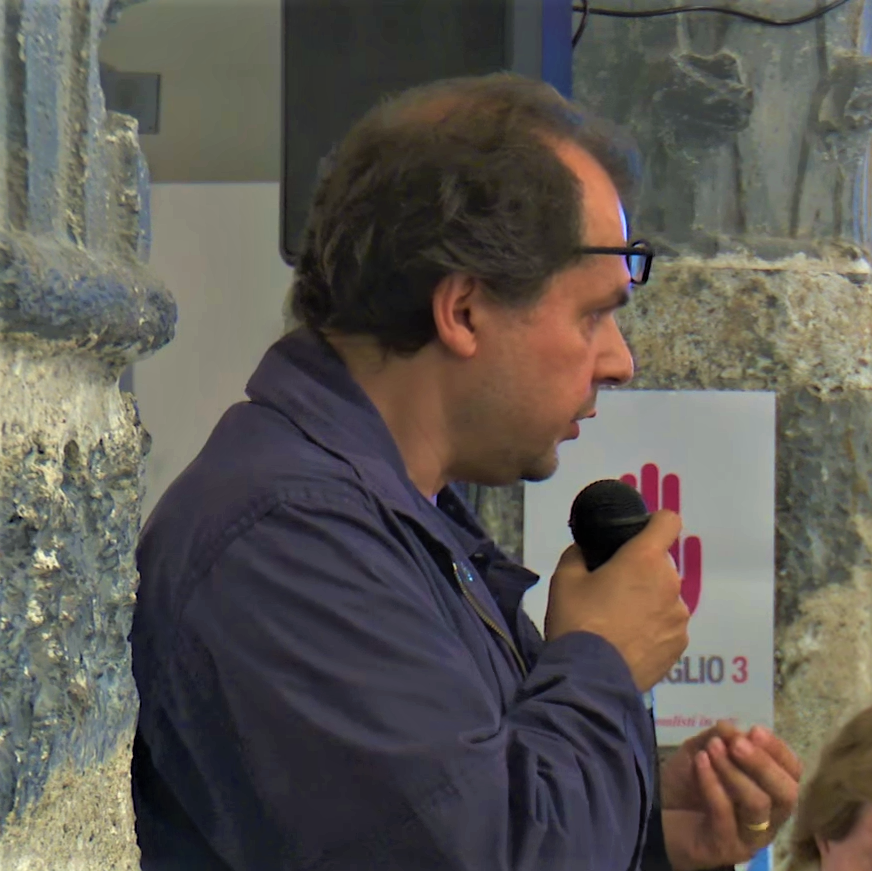 Marino Bisso al convegno LIBERI DI ESSERE INFORMATI - Genova, 16 Giugno 2016